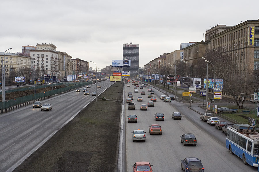 Ленинградский проспект в самом начале реконструкции (Январь 2007). Трамвайные пути сняты, построен временный пешеходный переход.